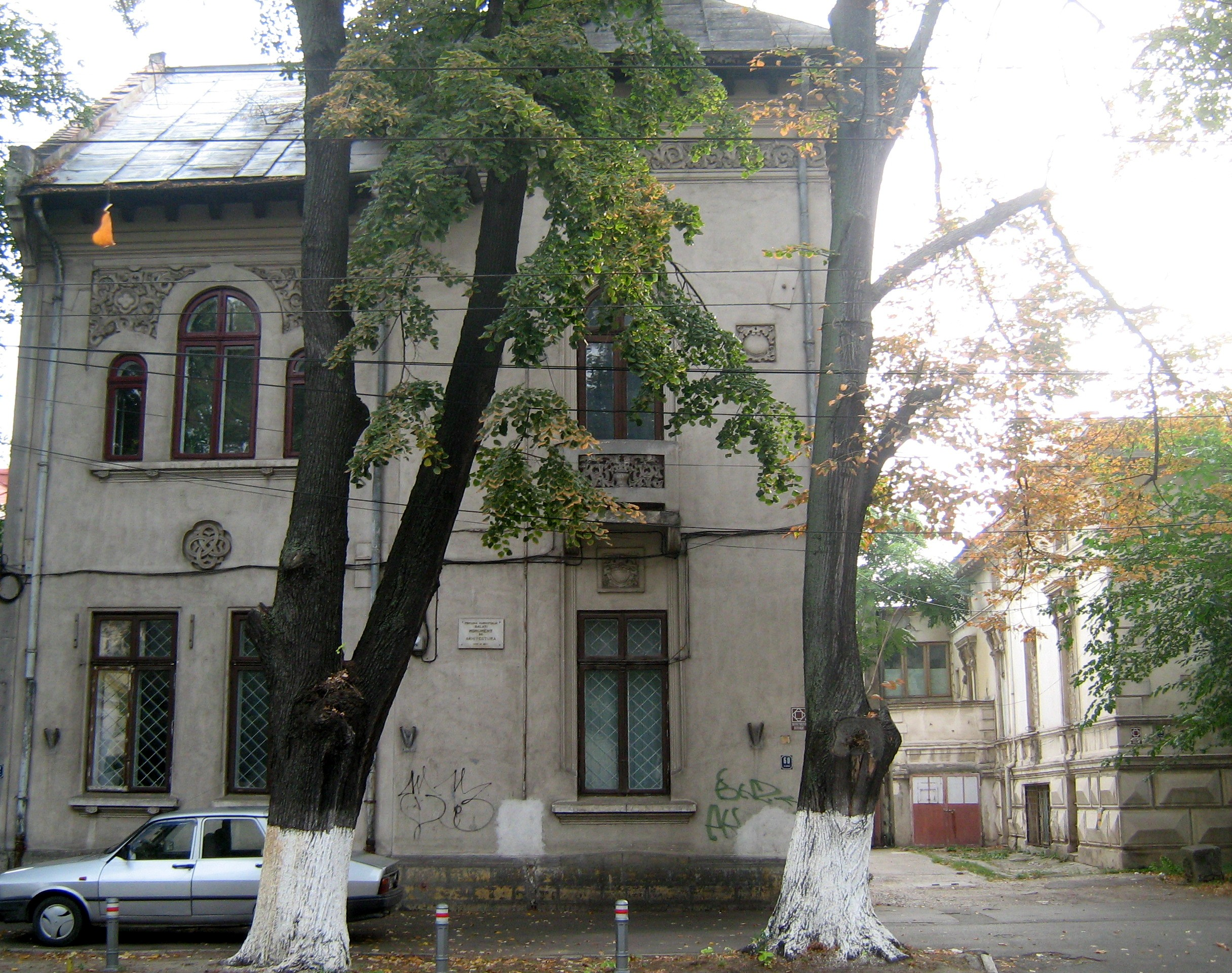 Casa Damian Draganescu